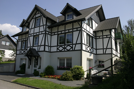 Fachwerk in Angfurten